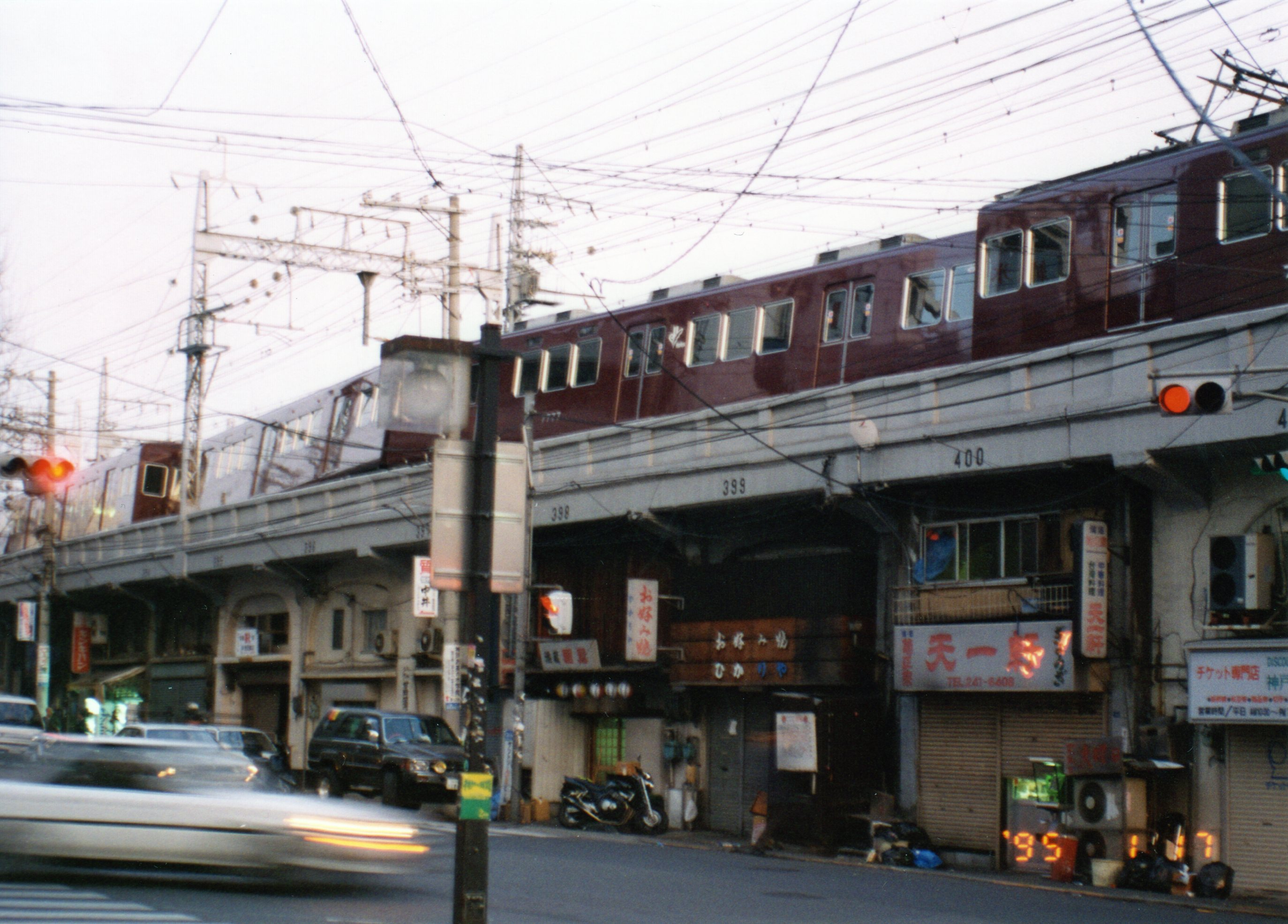 琴ノ緒町阪急高架（1995年1月17日）